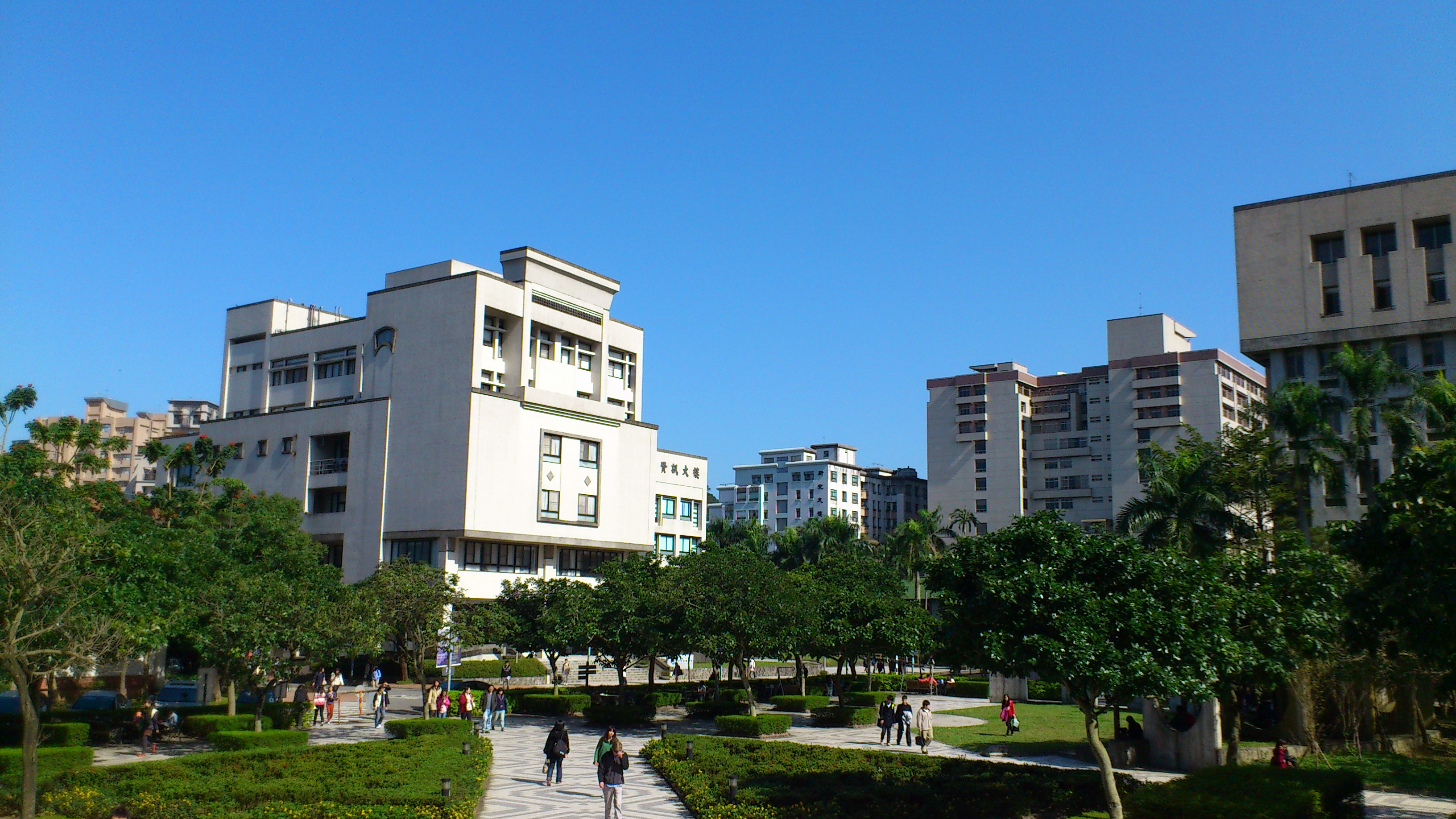 中文（台灣）: 政治大學資訊大樓與商學院